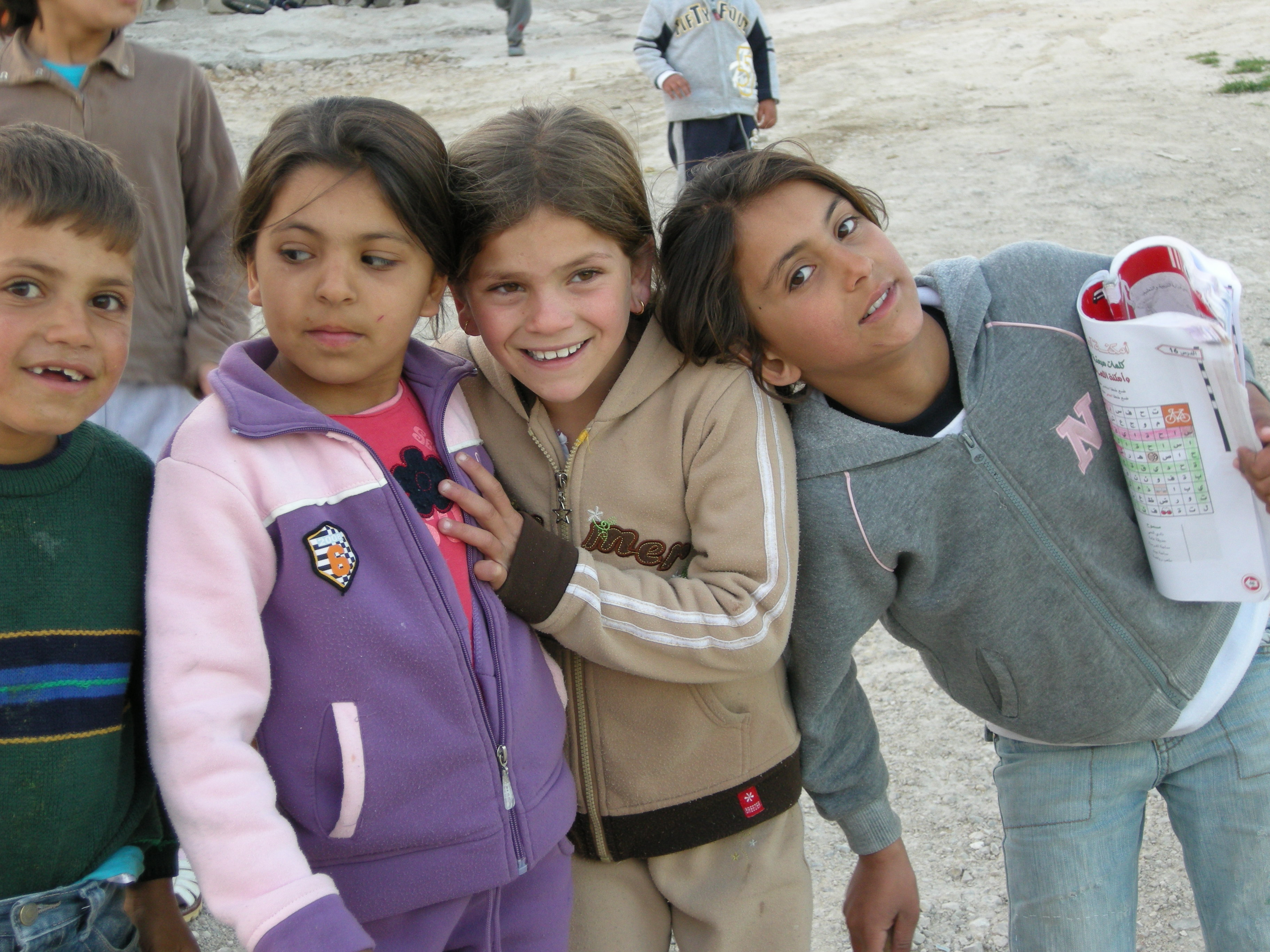 Photos from Drijat